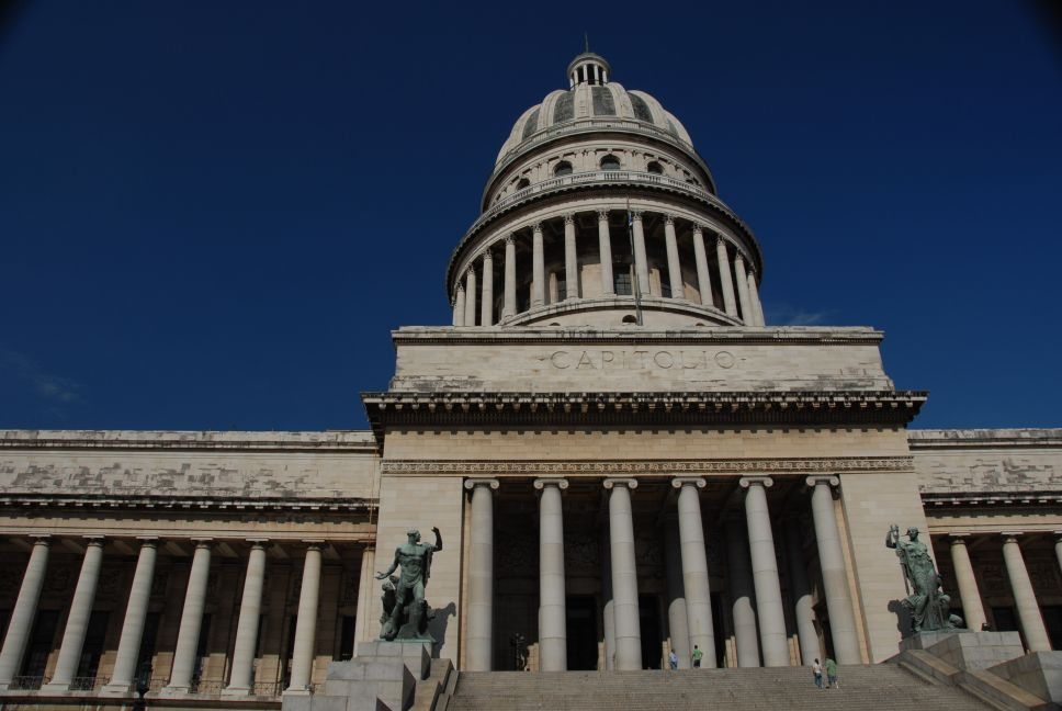 Cuba, augustus 2006, info in de Metadata